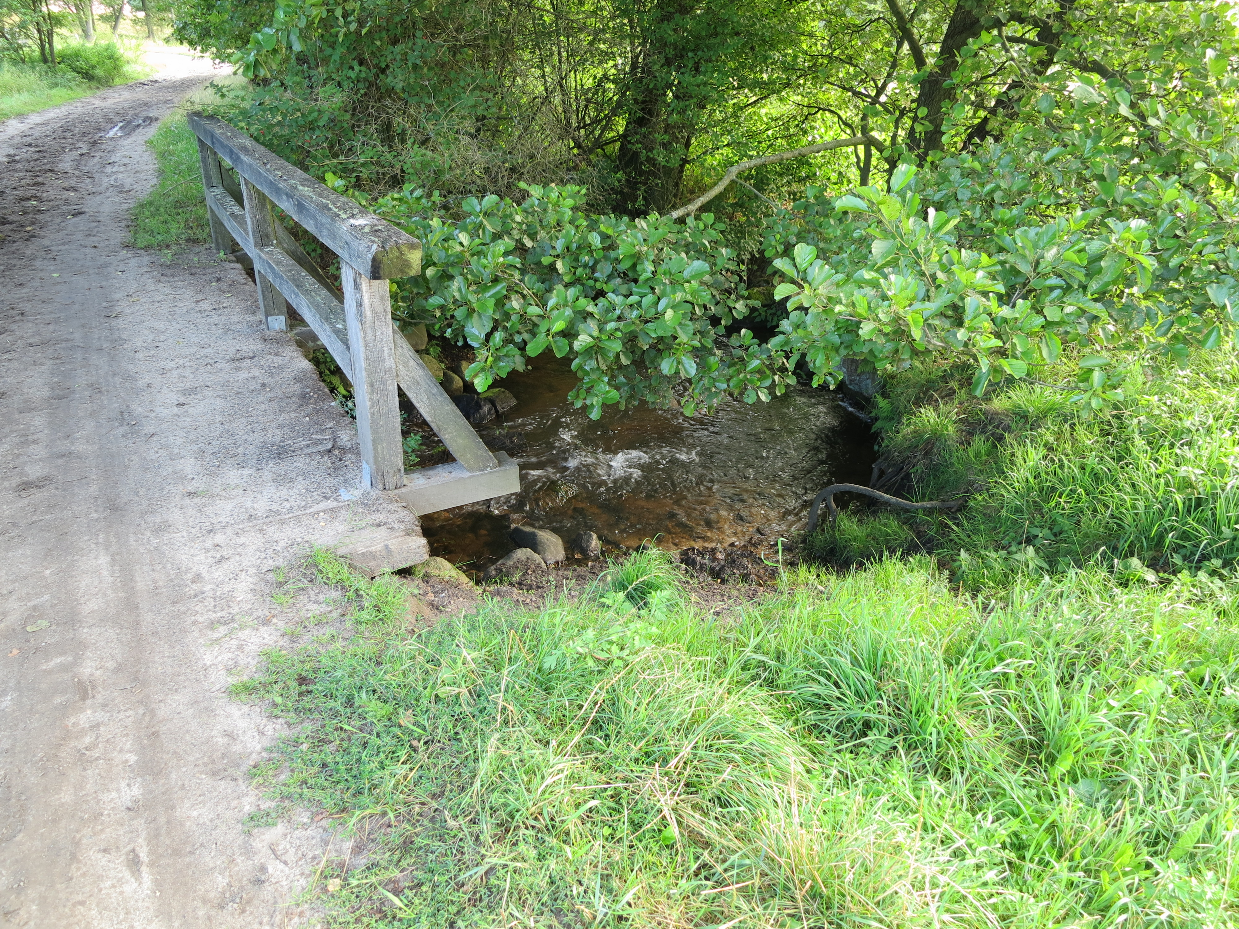 Der Radenbach in Egestorf